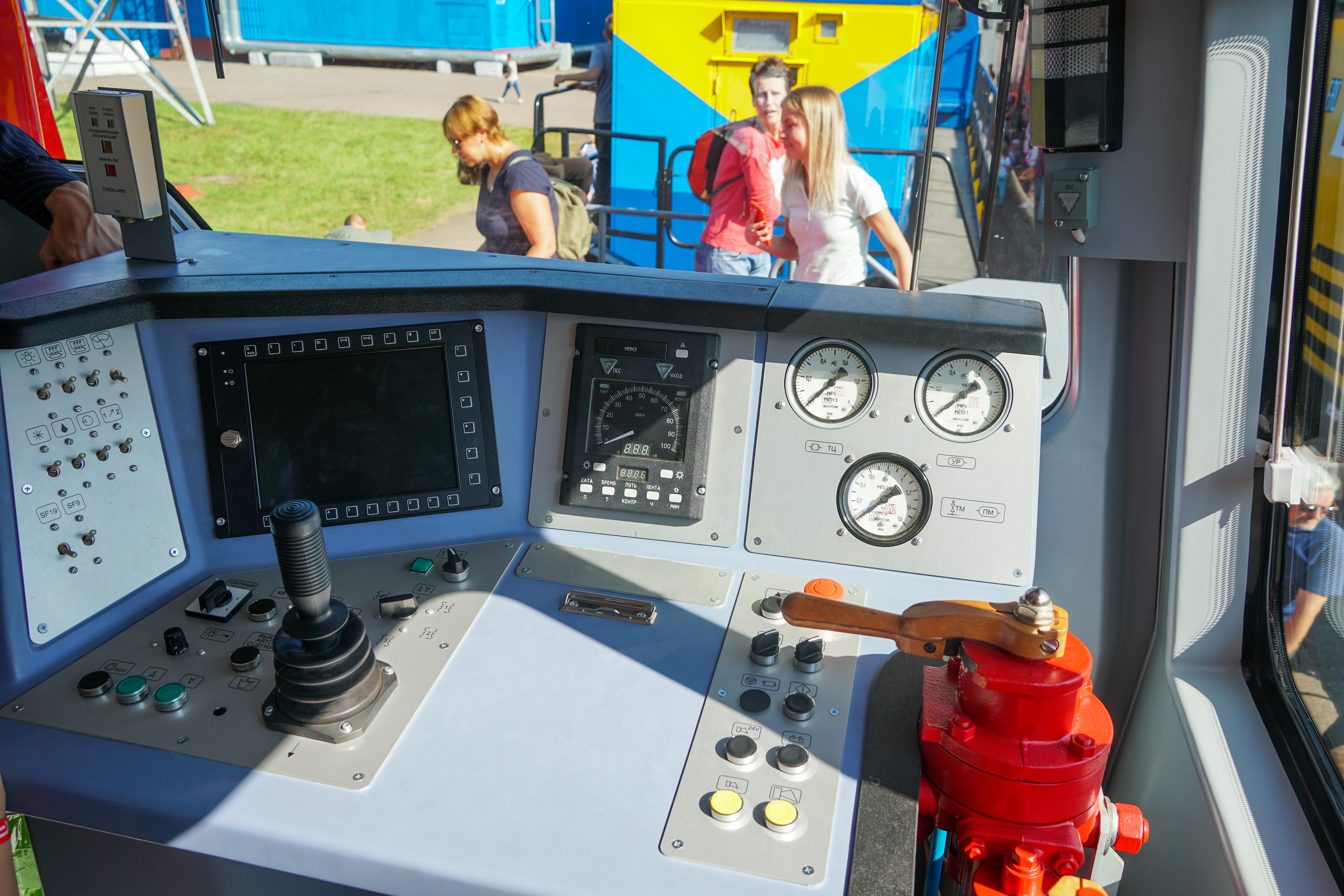 Пульт управления в кабине маневрового тепловоза ТГМК2-0001. Выставка ЭКСПО-1520 2019 года на территории депо кольца ВНИИЖТ в Щербинке